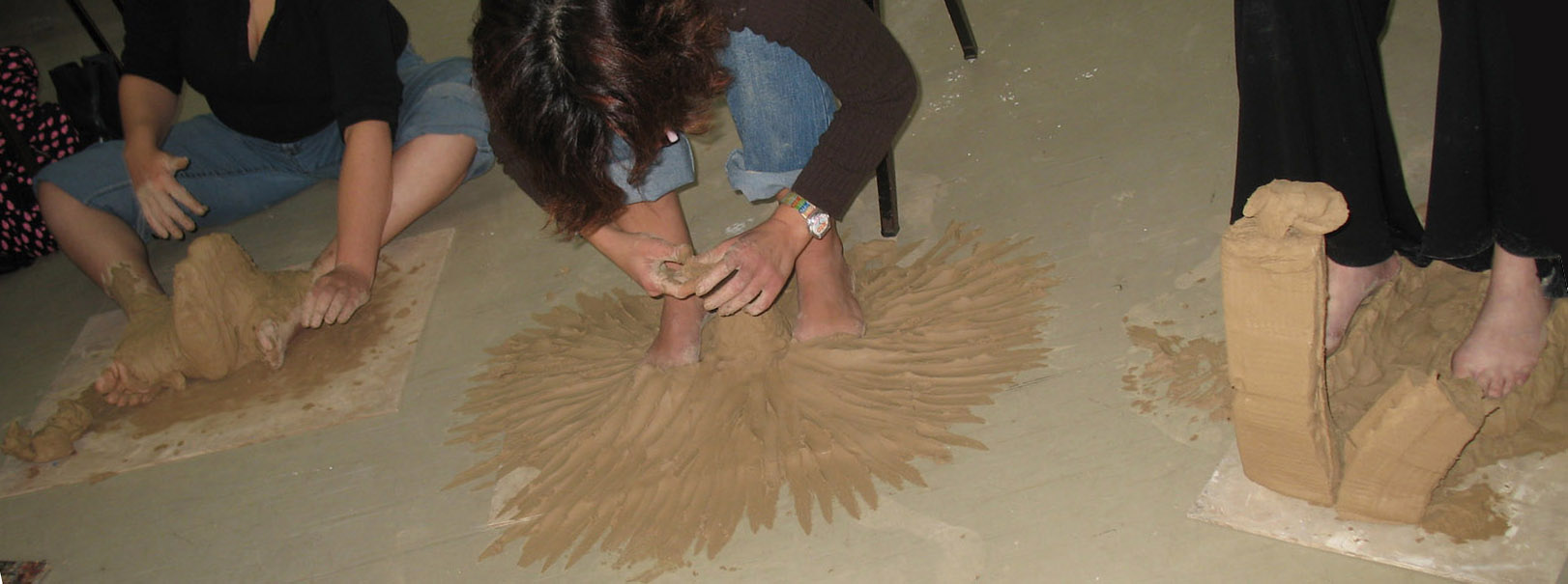 עבודות טיפול באמנות בחימר שלא ניתן לשמר אותן בשום צורה.